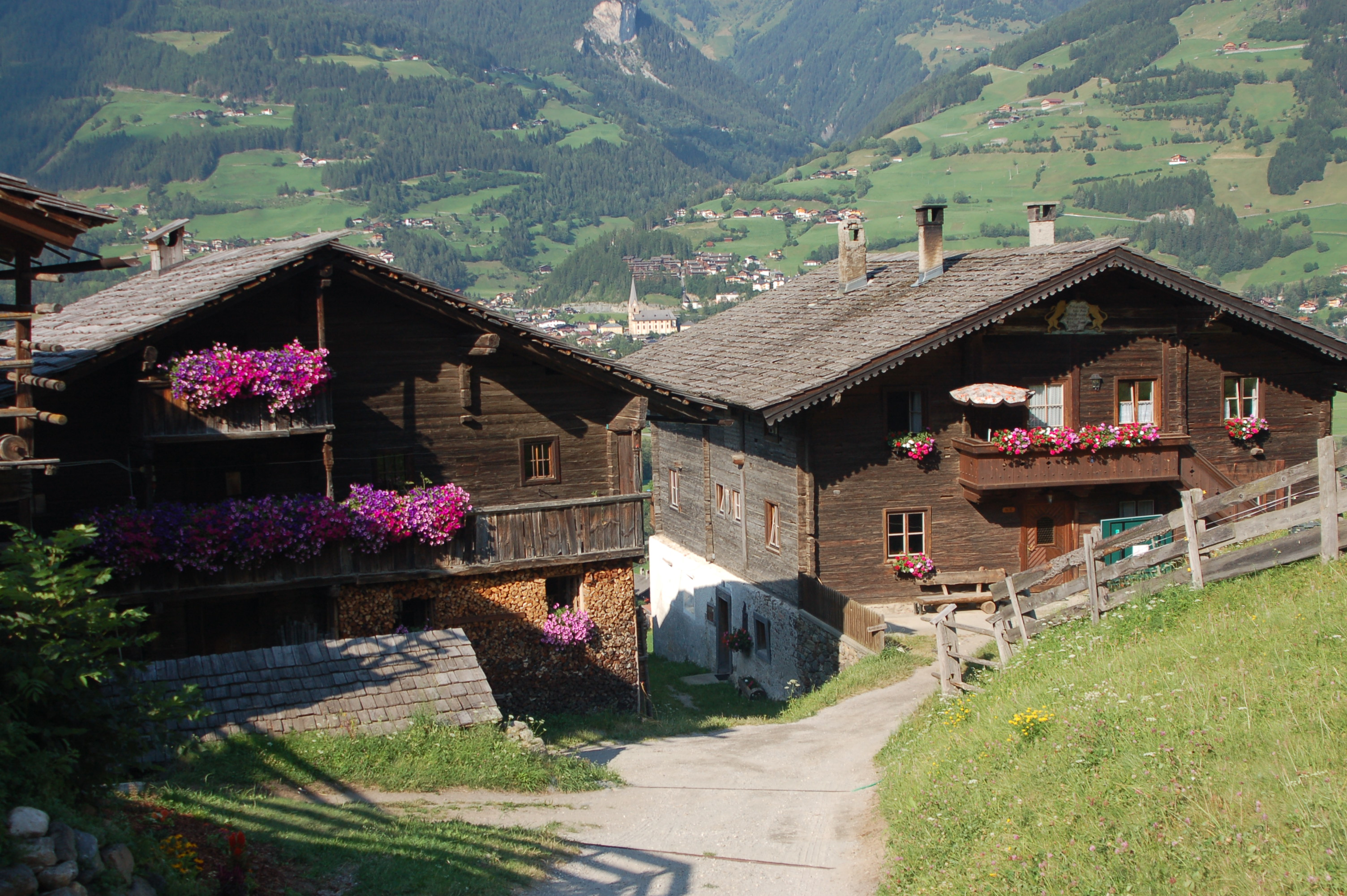 Die Bauernhöfe Klabiner (Ganz Nr. 14, links) und Messner (Ganz Nr. 15, rechts) in der Fraktion Ganz (Gemeinde Matrei in Osttirol) unterhalb der St.-Nikolaus-Kirche